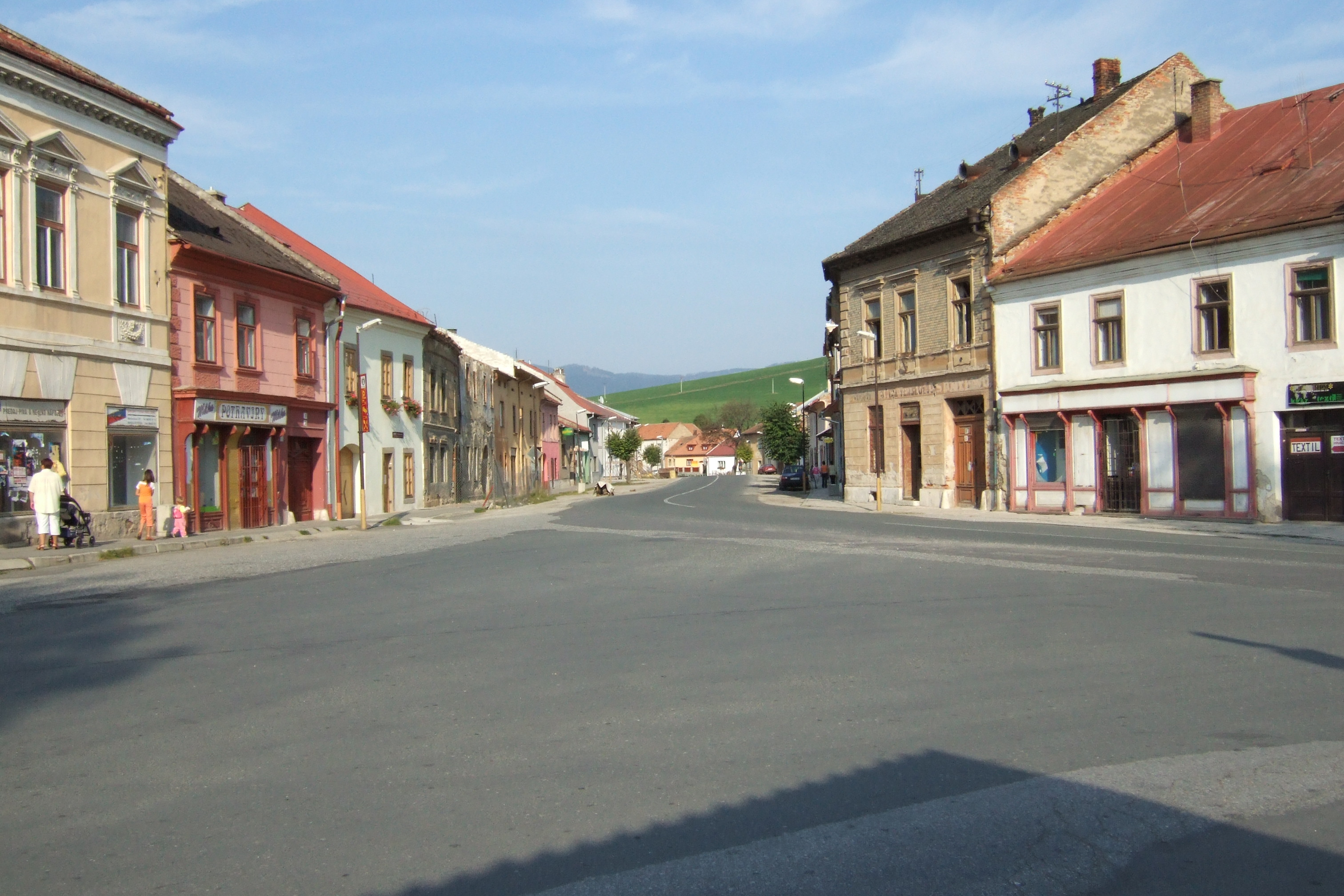 Part of central Spišské Podhradie, Slovakia. By me.